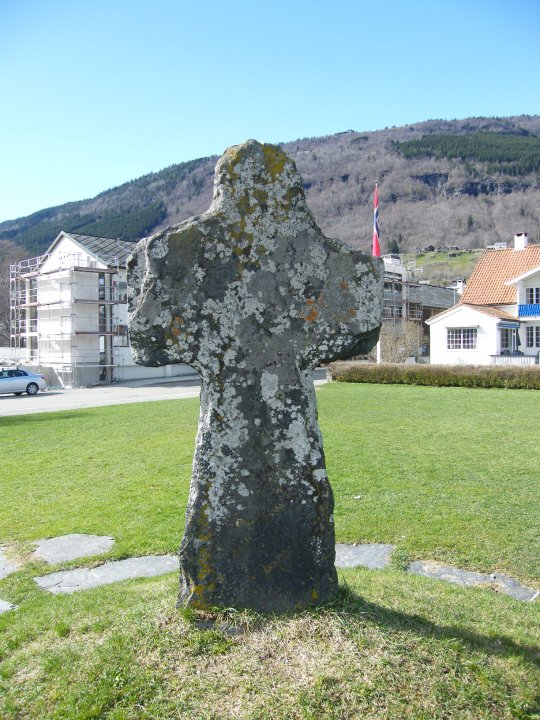 Steinkors, Voss Hordaland, datert til Middelalderen.